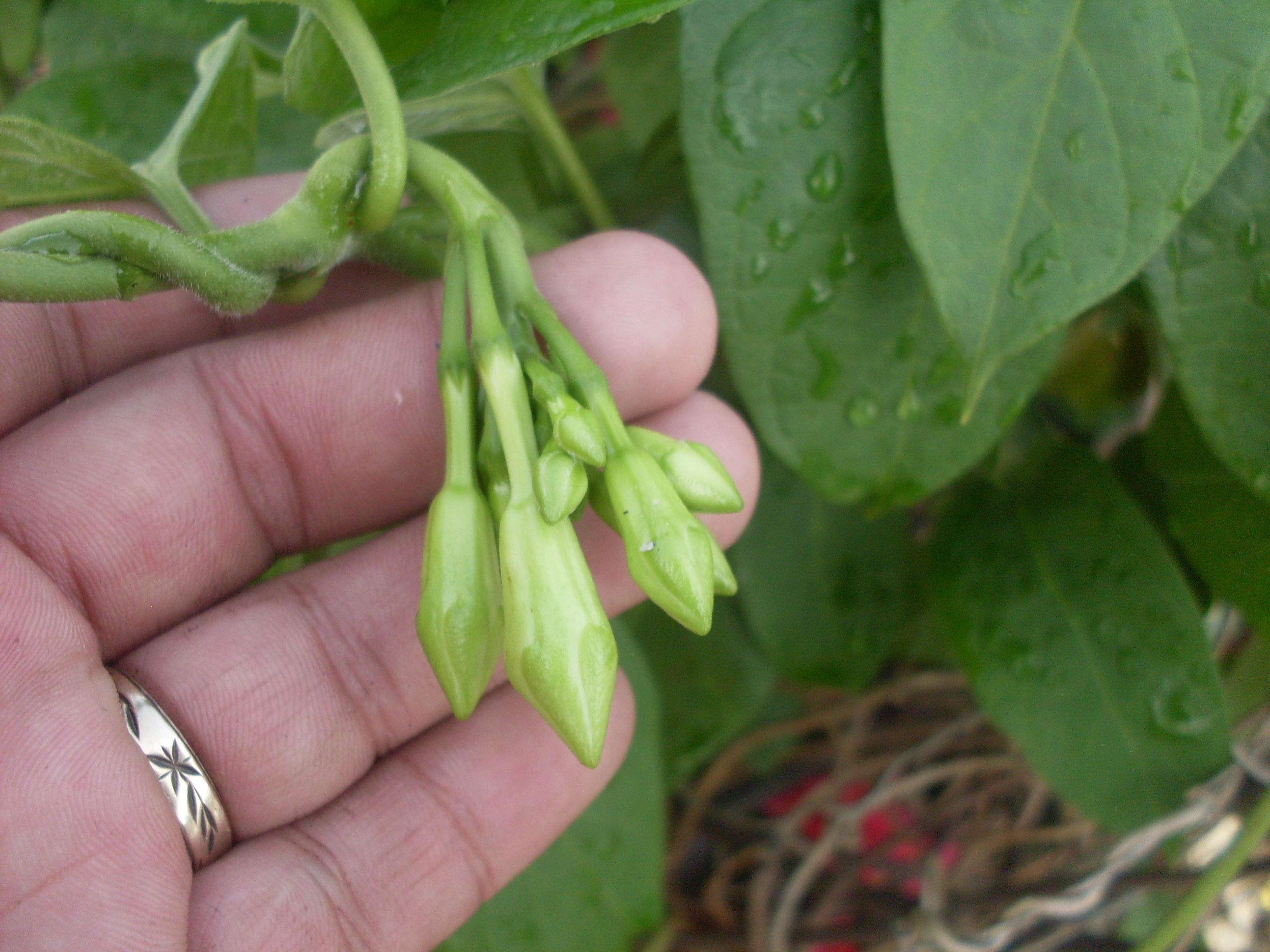 Loroco nativo de El Salvador 2